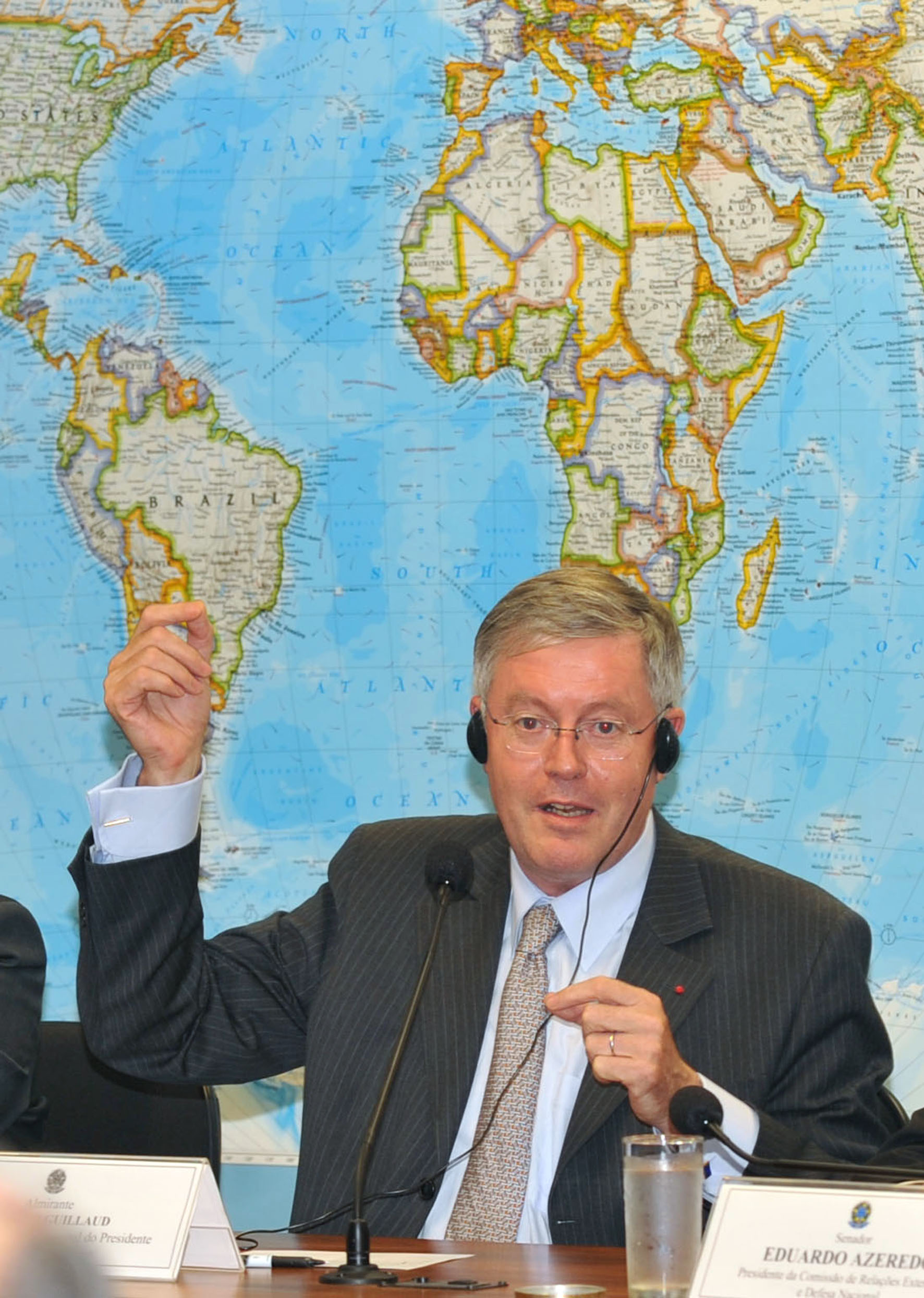 Édouard Guillaud